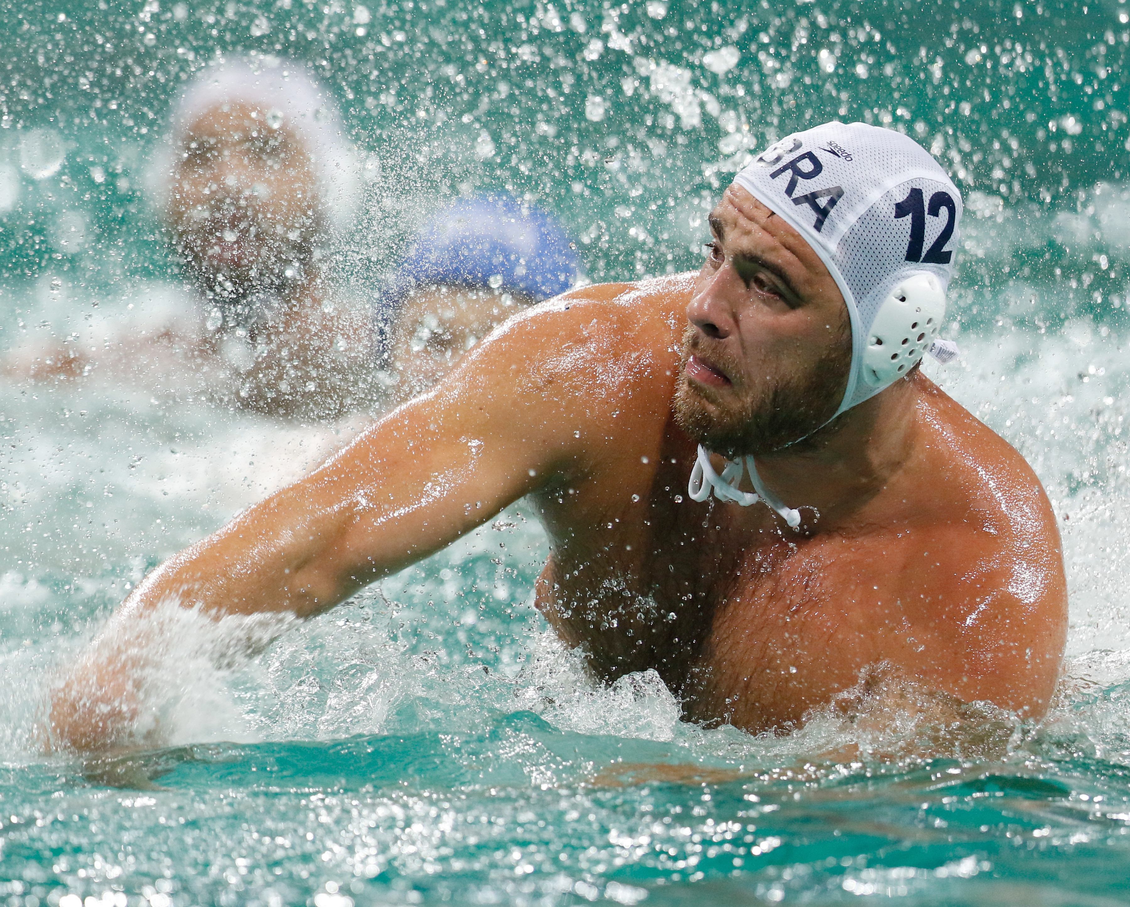 Rio de Janeiro - Seleção masculina brasileira de polo aquático vence a da Sérvia por 6 a 5 nos Jogos Olímpicos Rio 2016, no Parque Aquático Maria Lenk (Fernando Frazão/Agência Brasil)